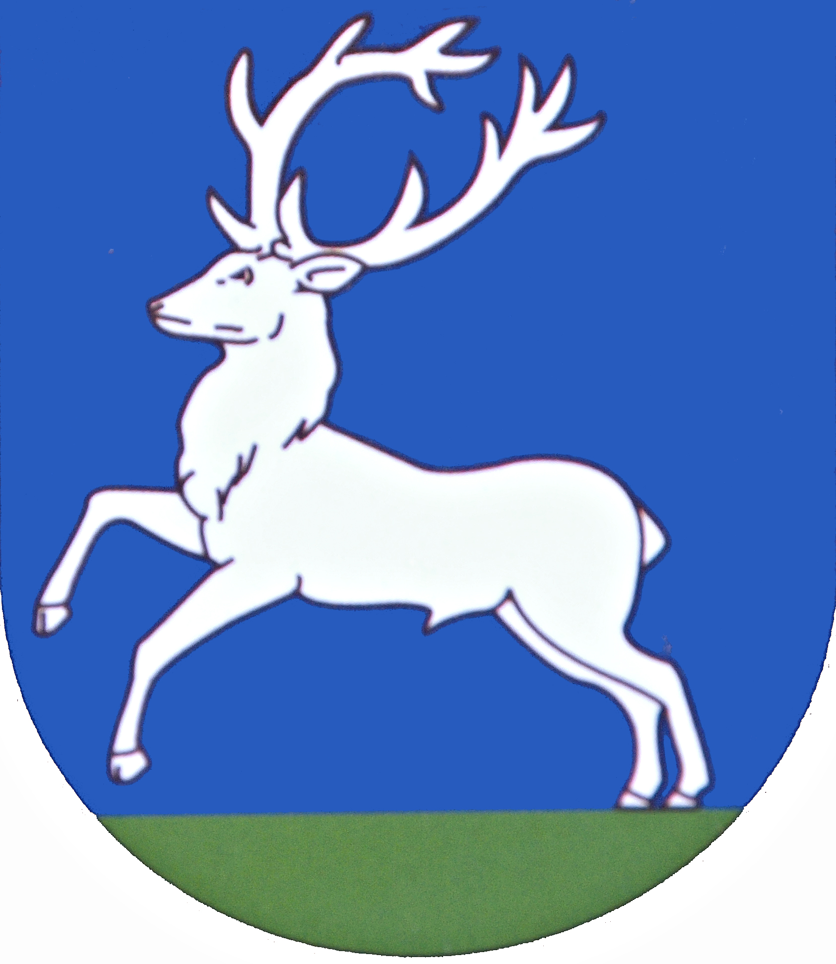 Žipov (Slovakia) - Blason